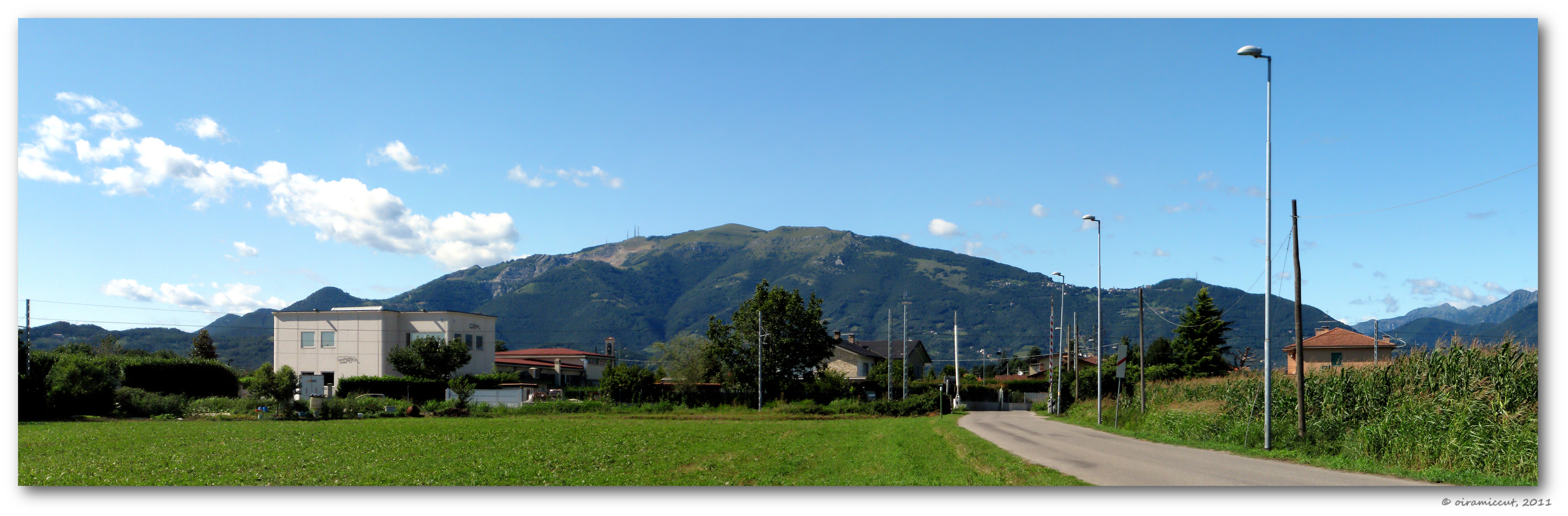 Il monte Linzone